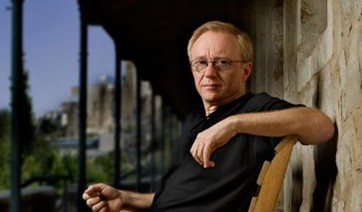 הסופר דויד גרוסמן במשכנות שאננים, ירושלים